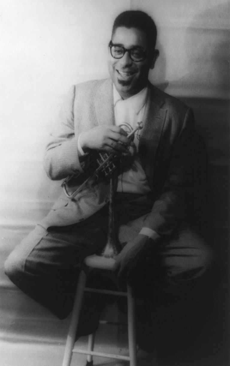 Dizzy Gillespie, 2 December 1955, portrait